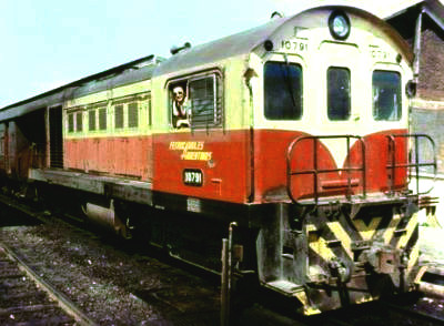 Locomotora Werkspoor DEB número 10791 en Estación Buenos Aires